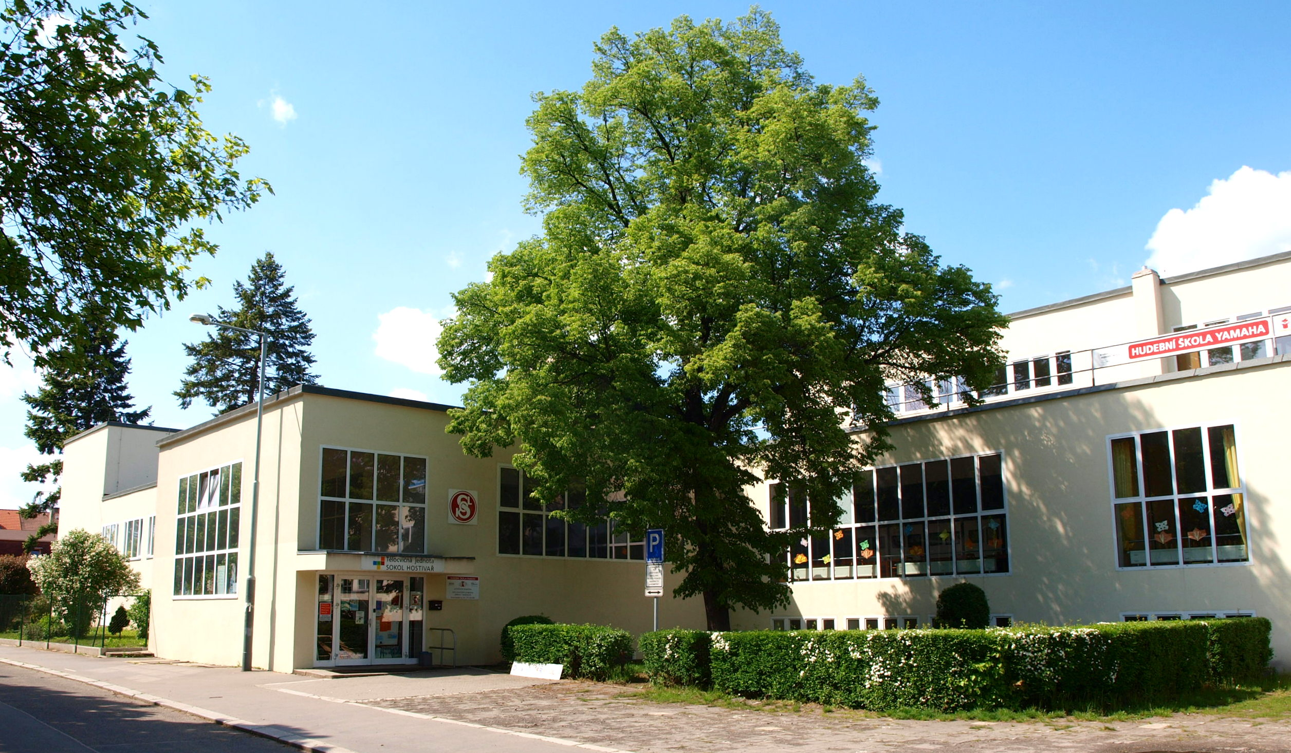 Praha 15, Hostivař, Sokol